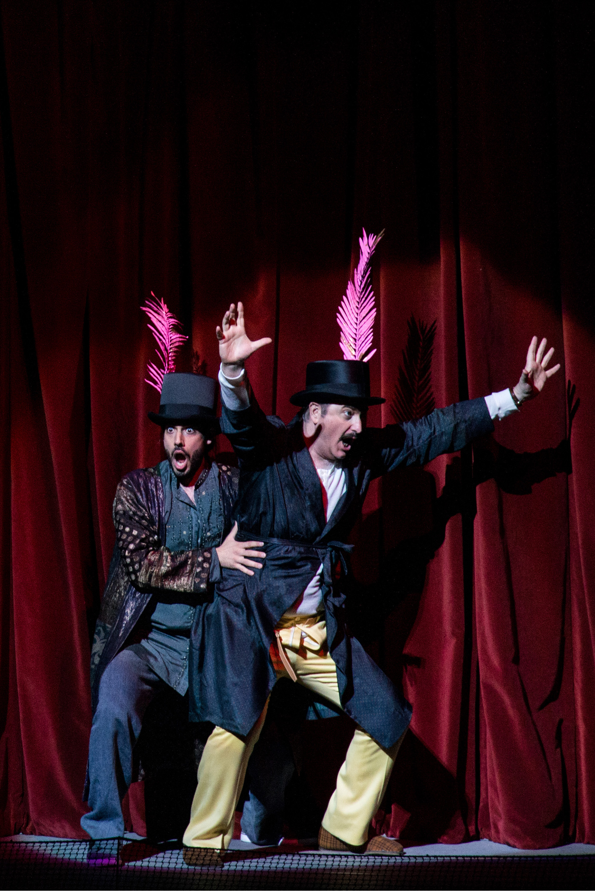 Premiere am 26 April 2015, Dirigent: Jesús López Cobos, Regie Irina Brook. Wiener Staatsoper